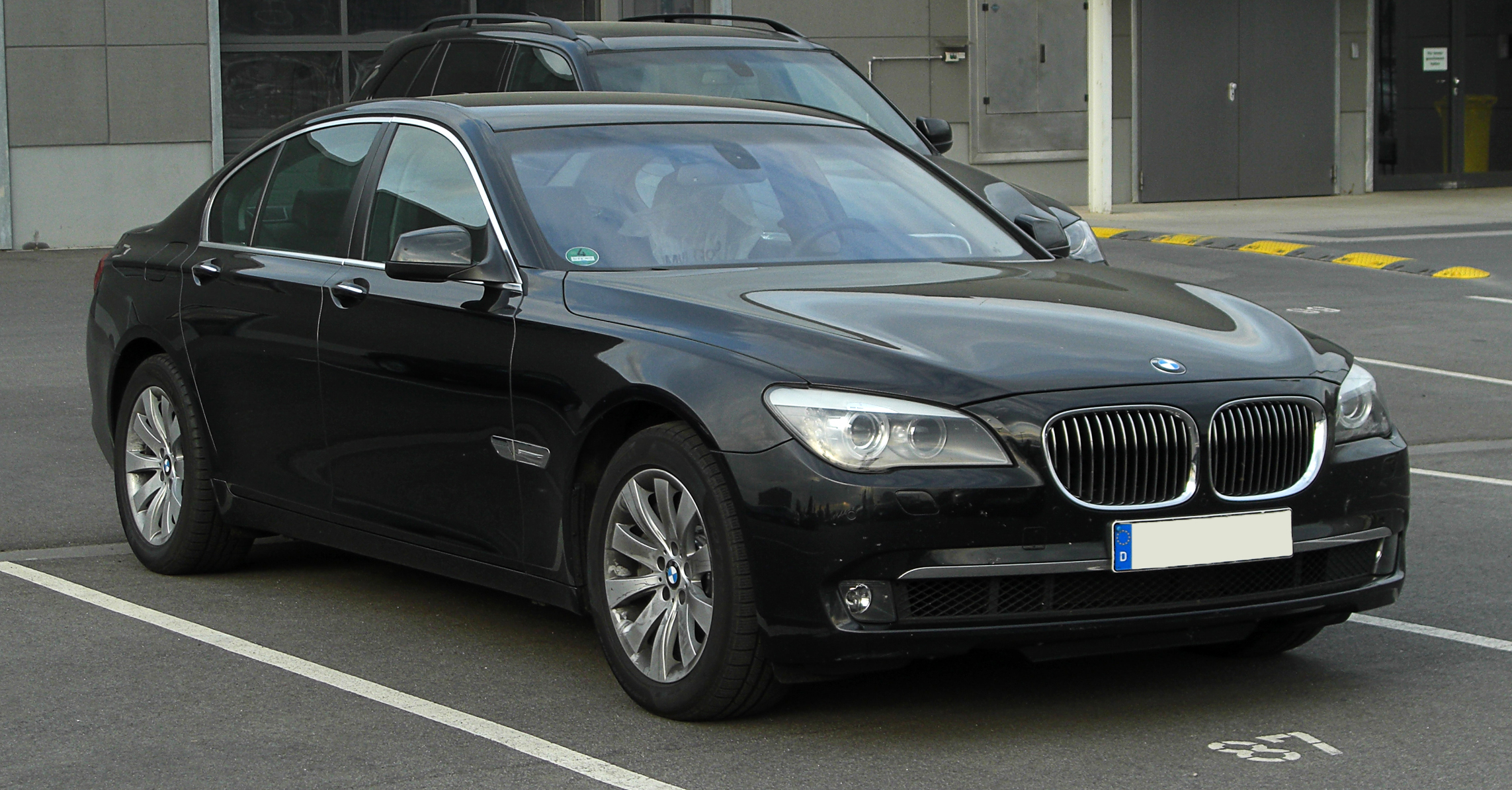 BMW 7er (F02)